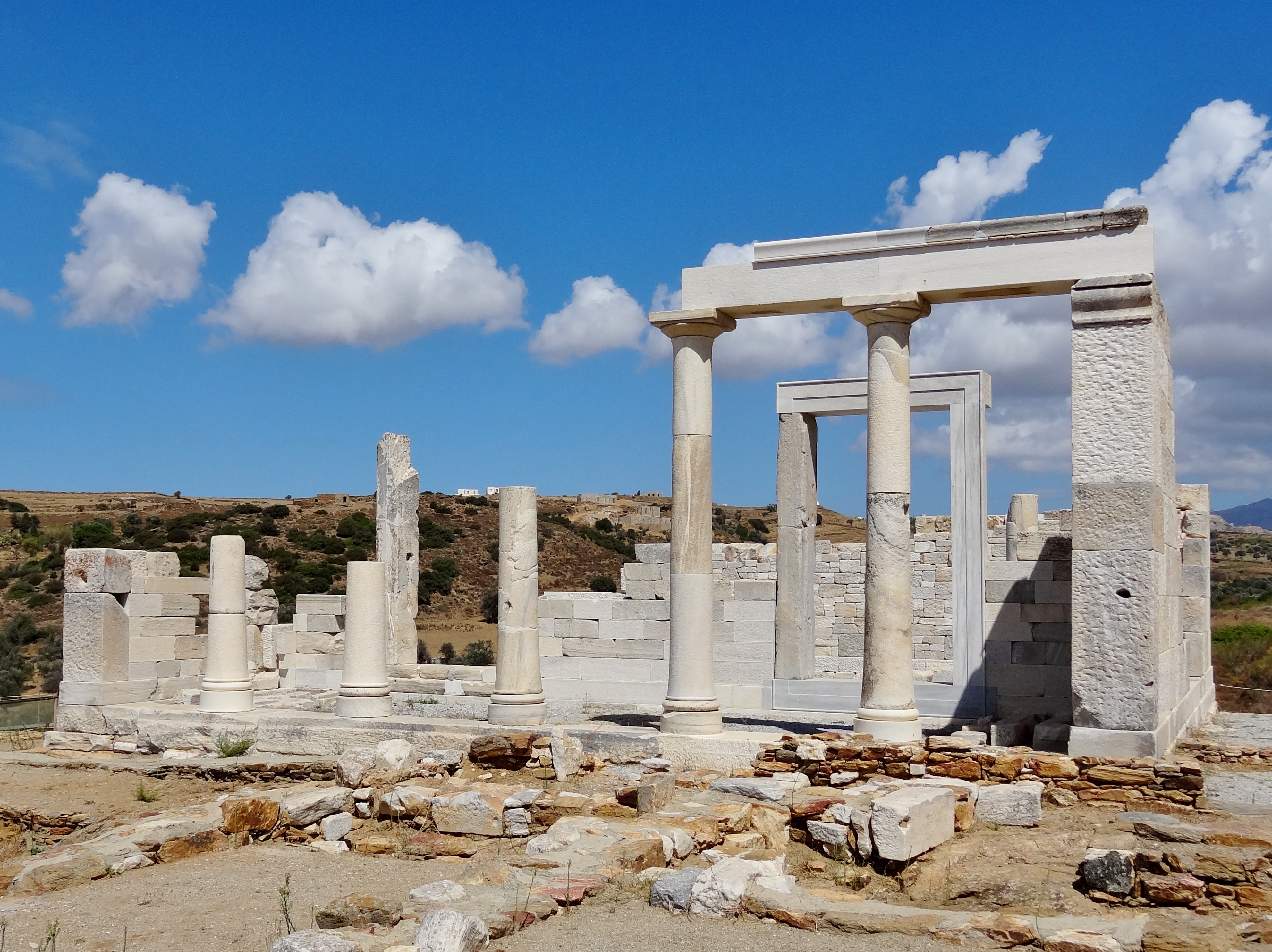 Demeter-Tempel von Gyroulas bei Ano Sangri auf Naxos, Kykladen, Griechenland